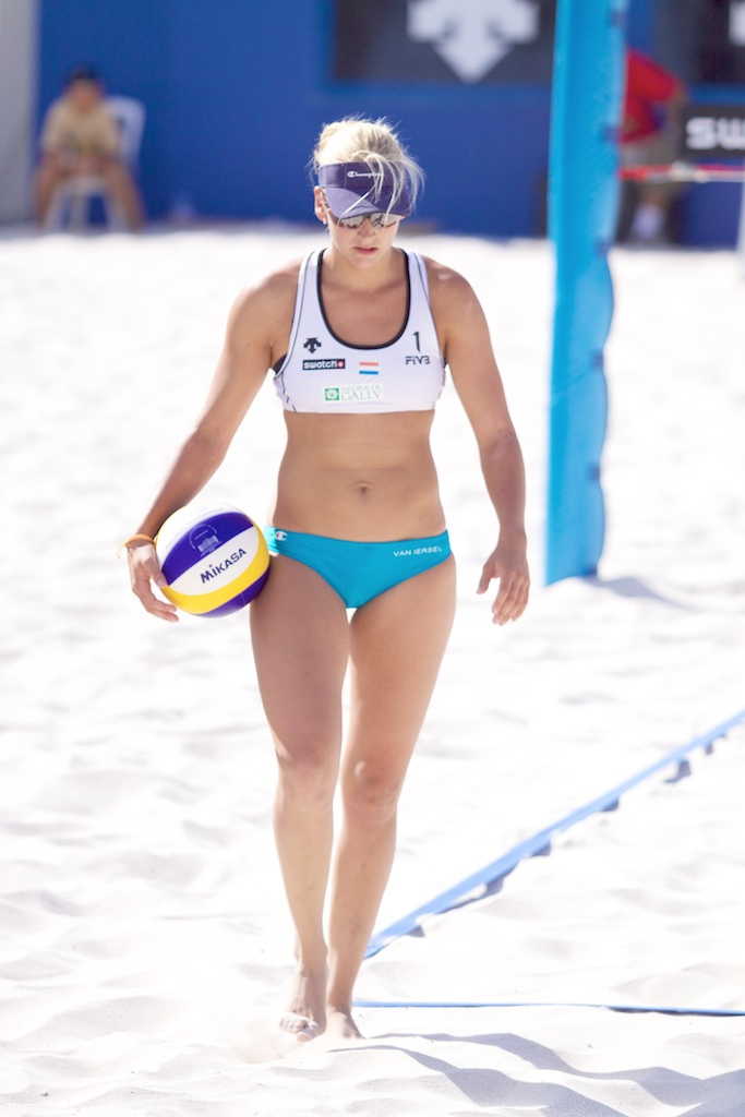 Marleen van Iersel au FIVB World Tour 2010 à Marseille